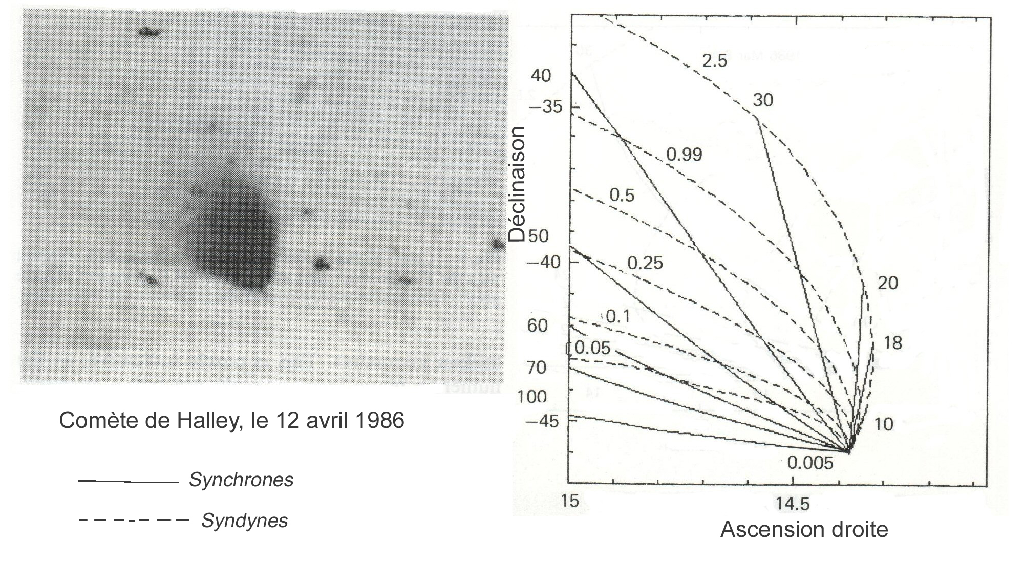 comète de Halley le 12 avril 1986